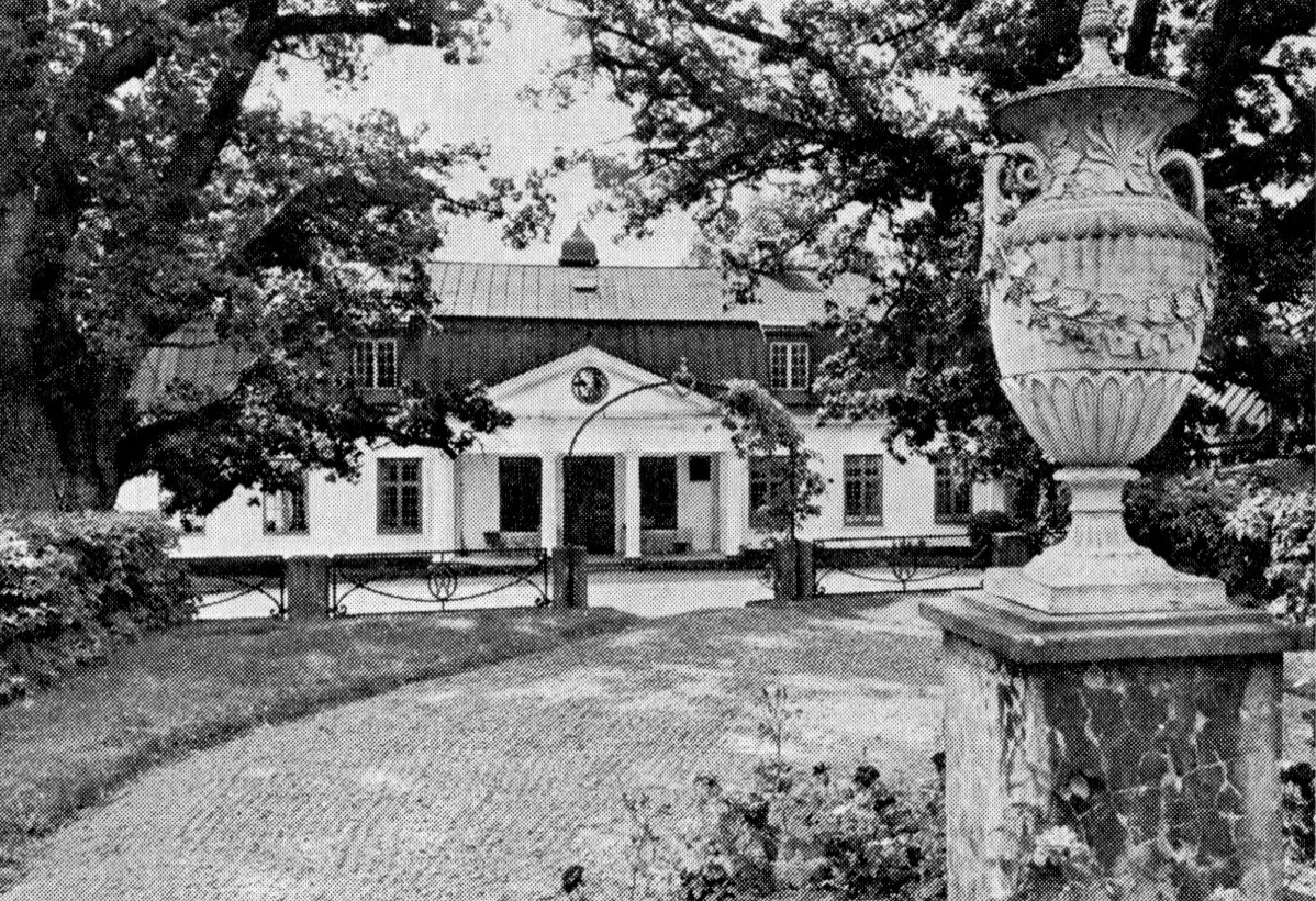 Kappsta gård, huvudbyggnad